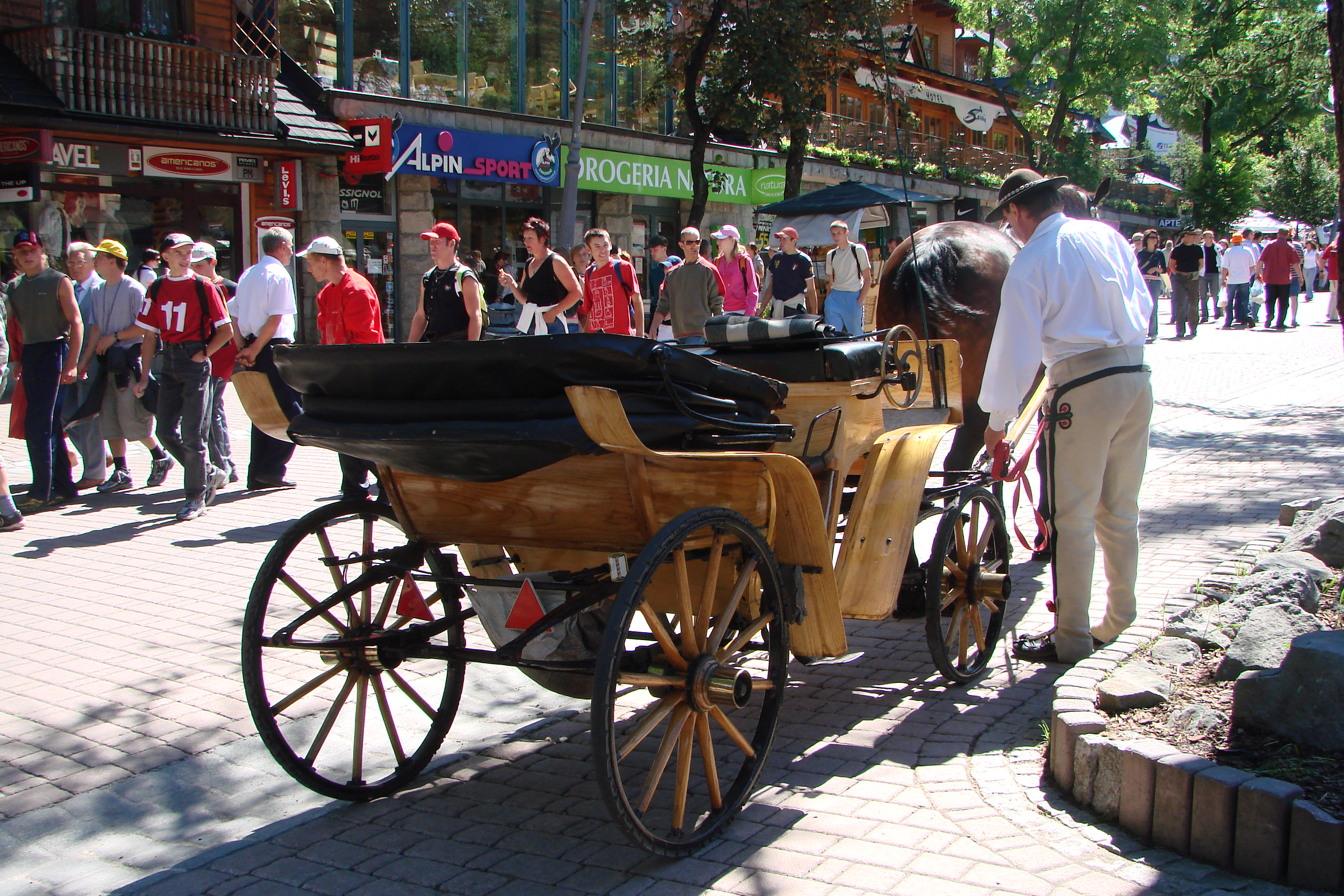 Zakopane, Poland